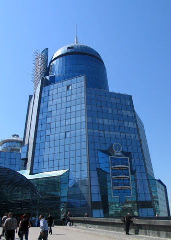 Лицензия